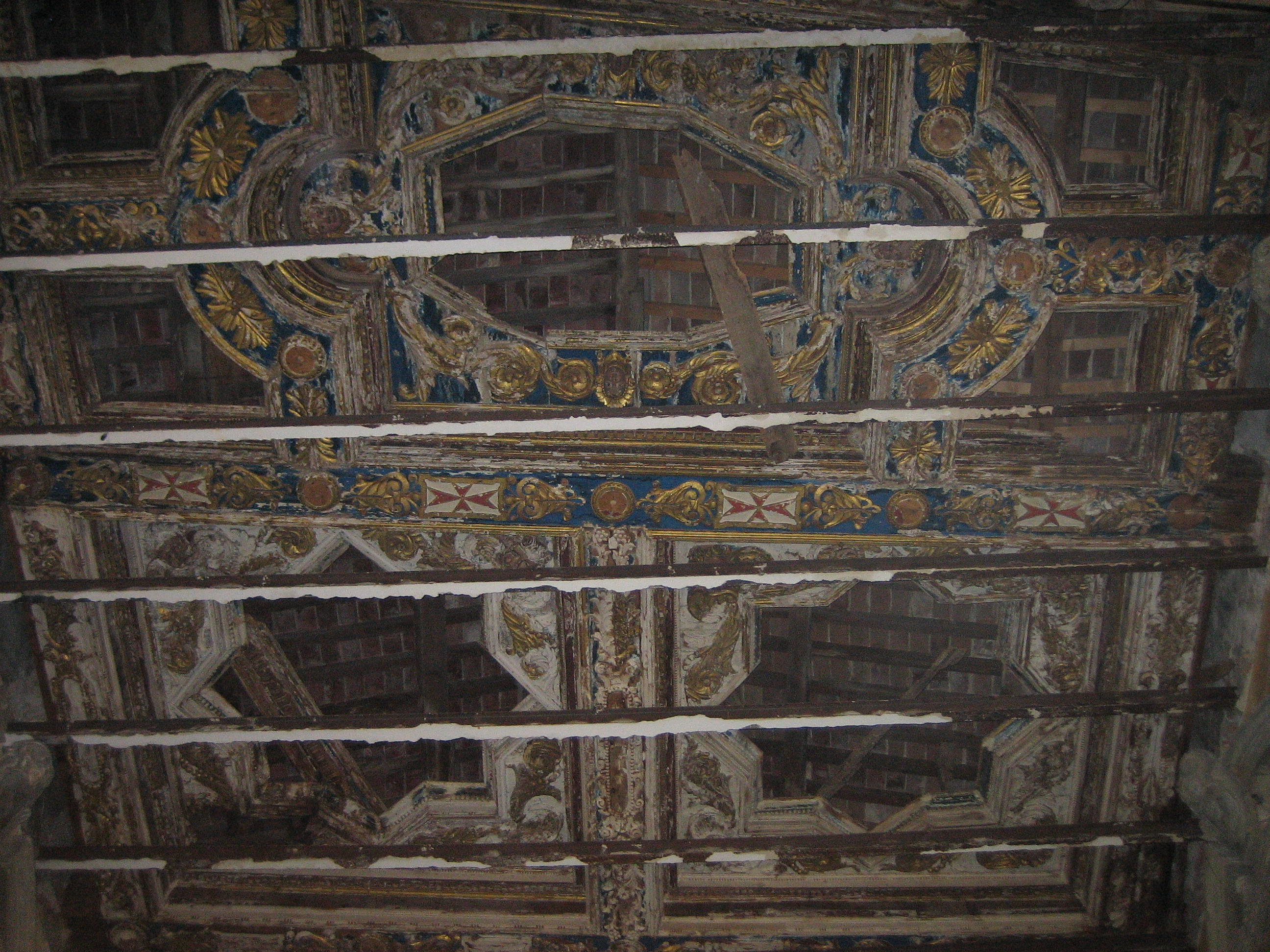 Dettaglio del soffitto cassettonato oggi